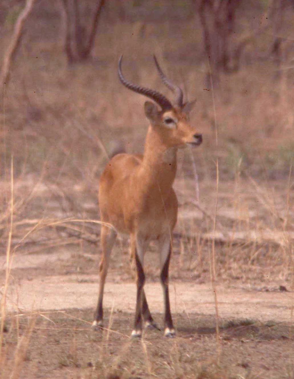 Cobe de Buffon de la région de Boundiali, en Cote d'Ivoire